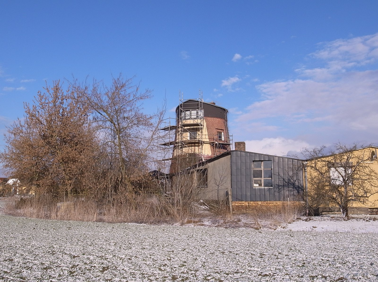 Wörlitz (Griesen)_Windmühle, Koordinaten: N51 50.156 E12 25.534